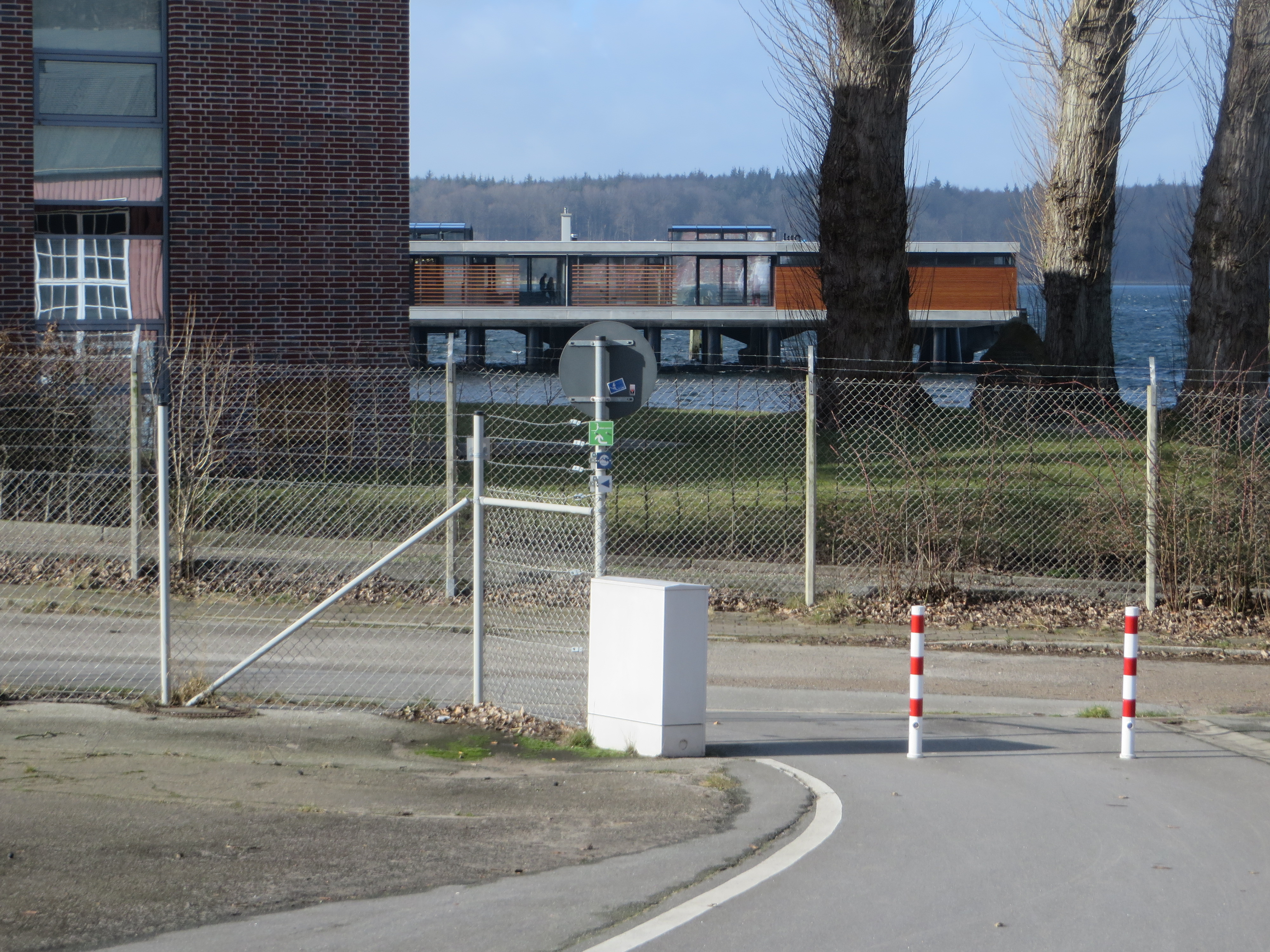 Ostseite vom Kapitänshaus Sonwik mit Blick auf den Antrax-Gedenkstein (die Antrax gehörte zur Torpedostation) und dem neu gebauten Wasserhaus auf der Nordmole (Flensburg-Mürwik 22 Februar 2017)